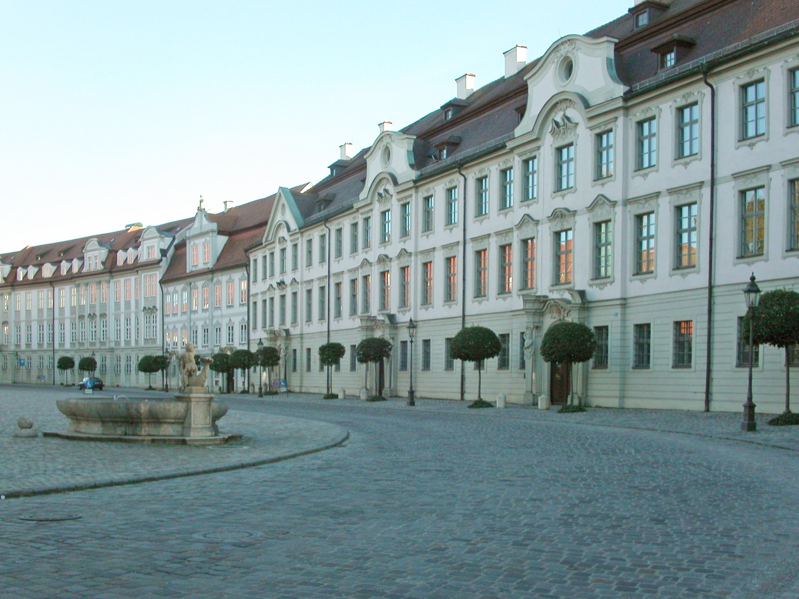 Altstadt von Eichstätt